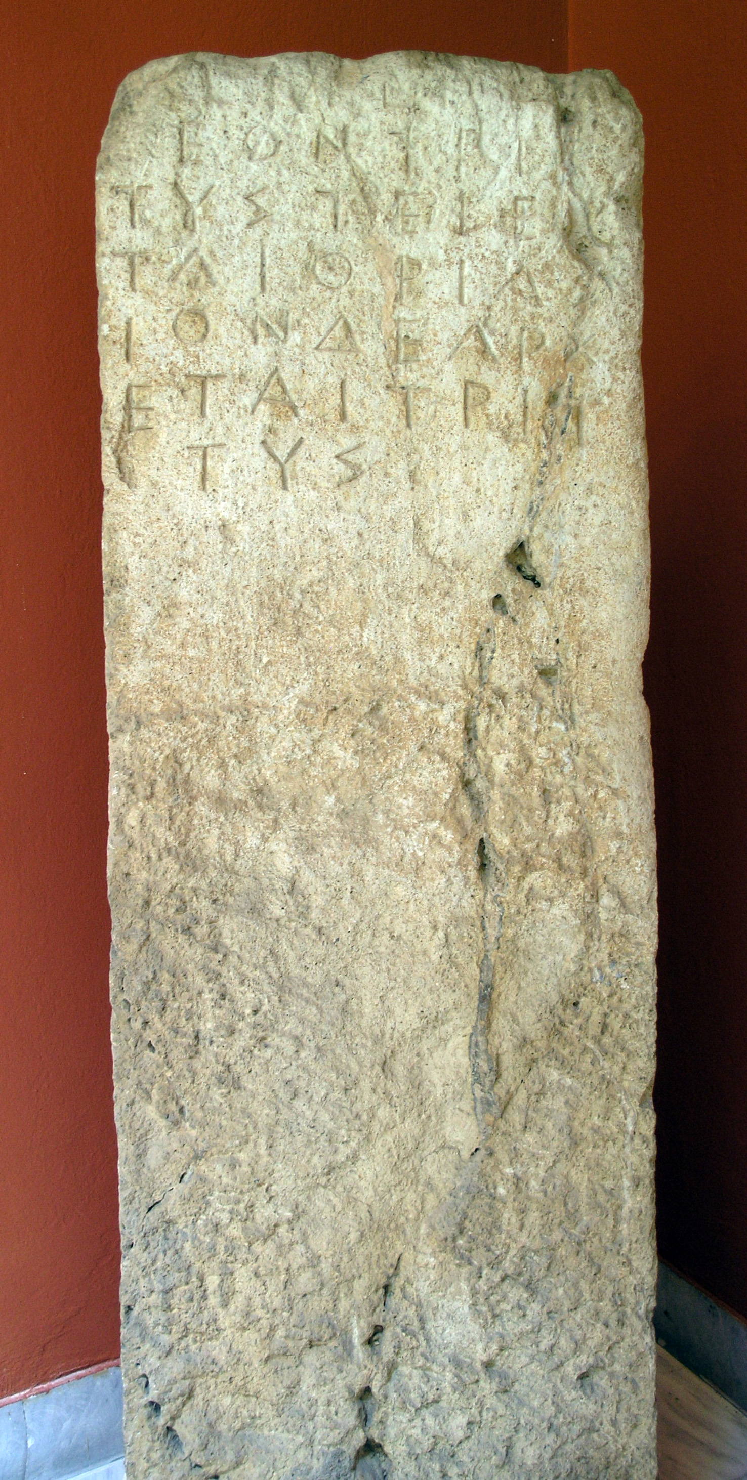 Borne des trittyes des Pedieis et Thriasioi, du Pirée, vers le milieu du Ve siècle av. J.-C.